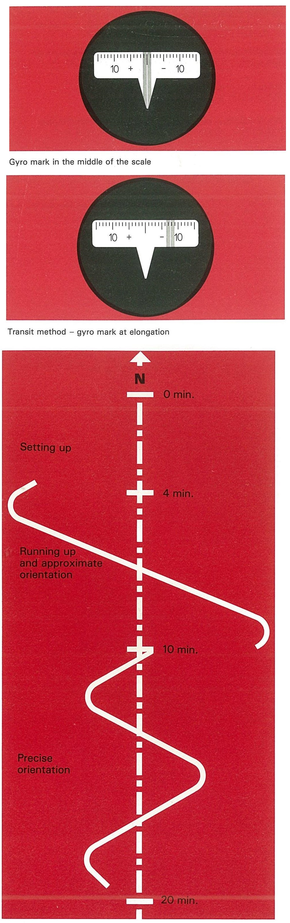 Изглед при отчитане показания на жиропроставка Wild GAK1 и принципна схема на работа.